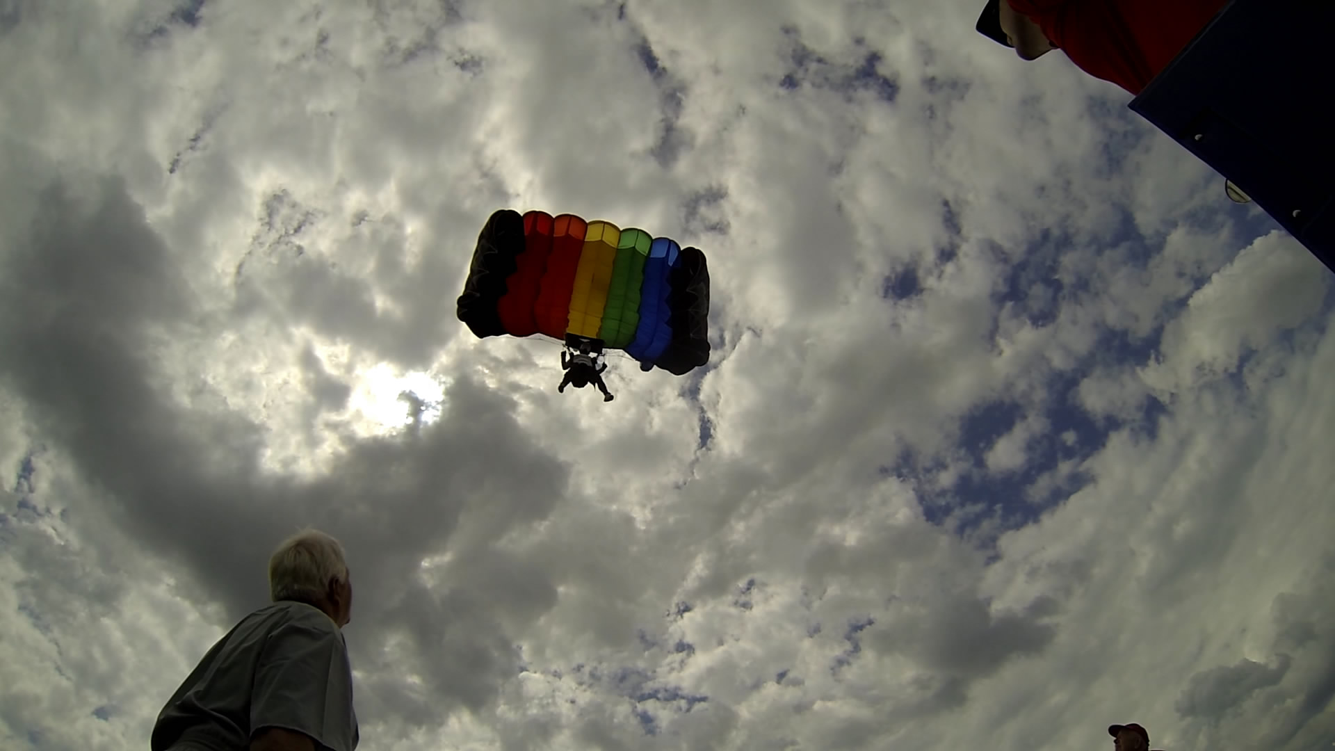 Spadochronowe Mistrzostwa Śląska 2014 - konkurencja spadochrony klasyczne